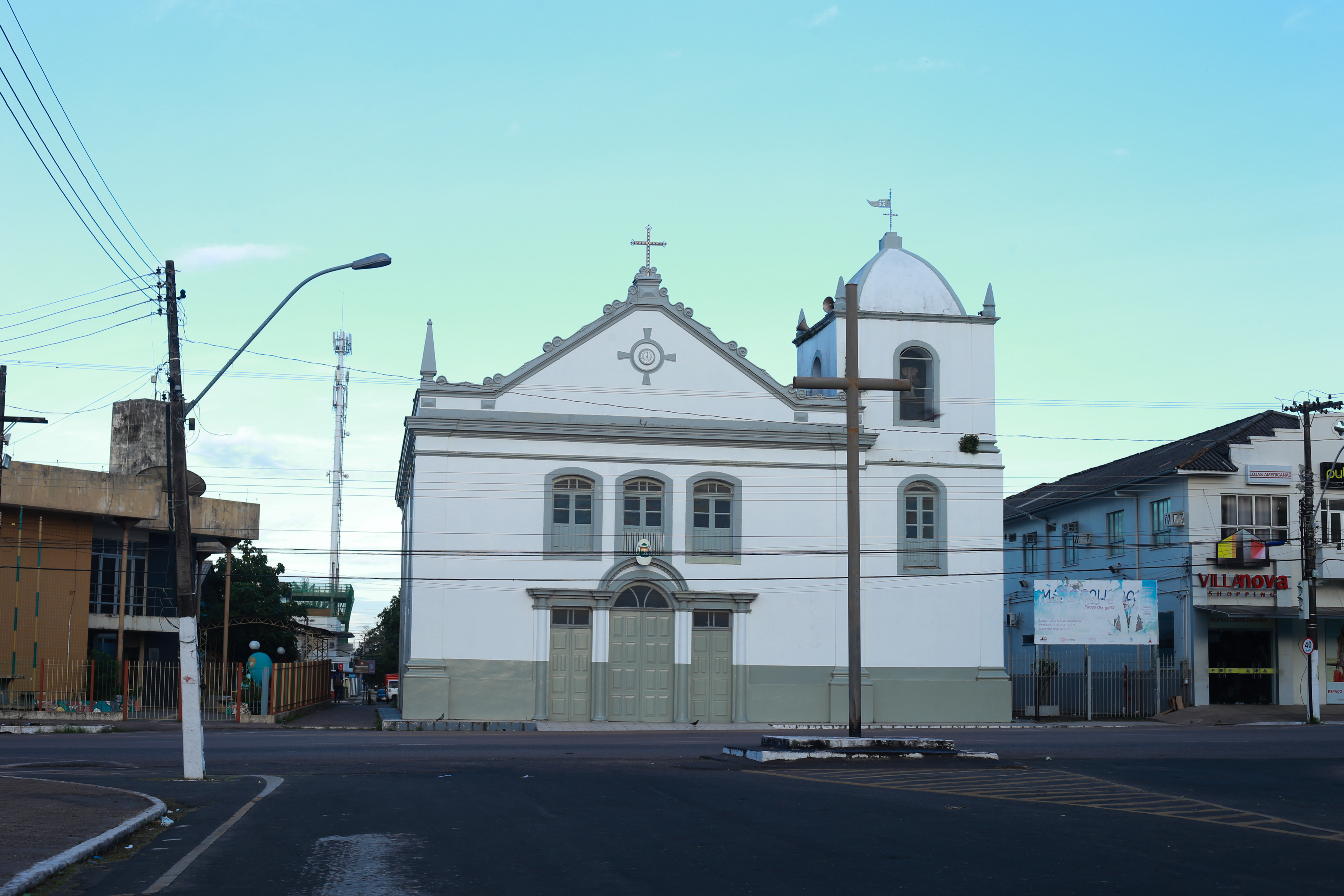 Visão frontal da Igreja Matriz